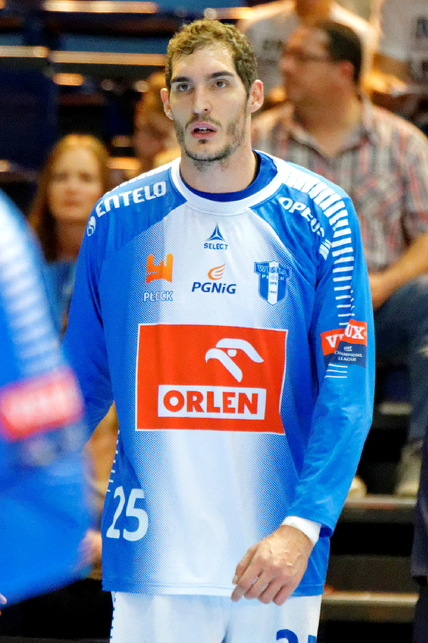 Rencontre de phase de groupe de la ligue des champions 2015-16 entre le PSG et le club polonais de Orlen Wisla Plock. A la Halle Carpentier (Paris), le 27 septembre 2015.